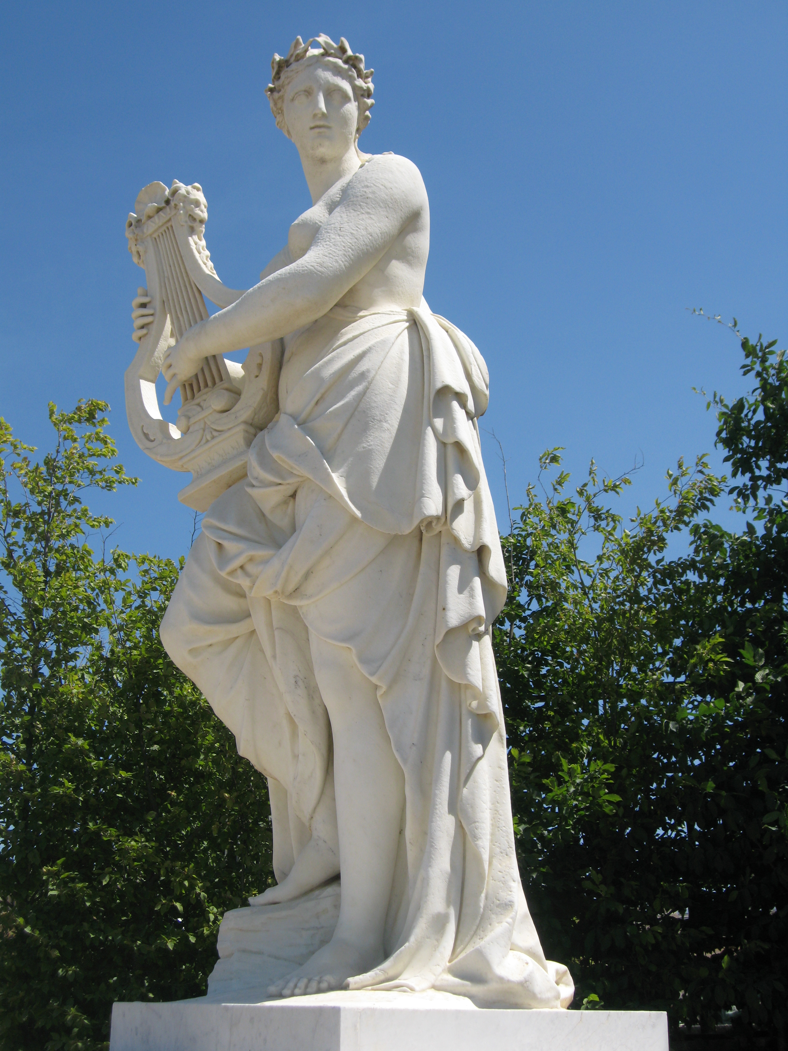 Le Poème lyrique, par Jean-Baptiste Tuby